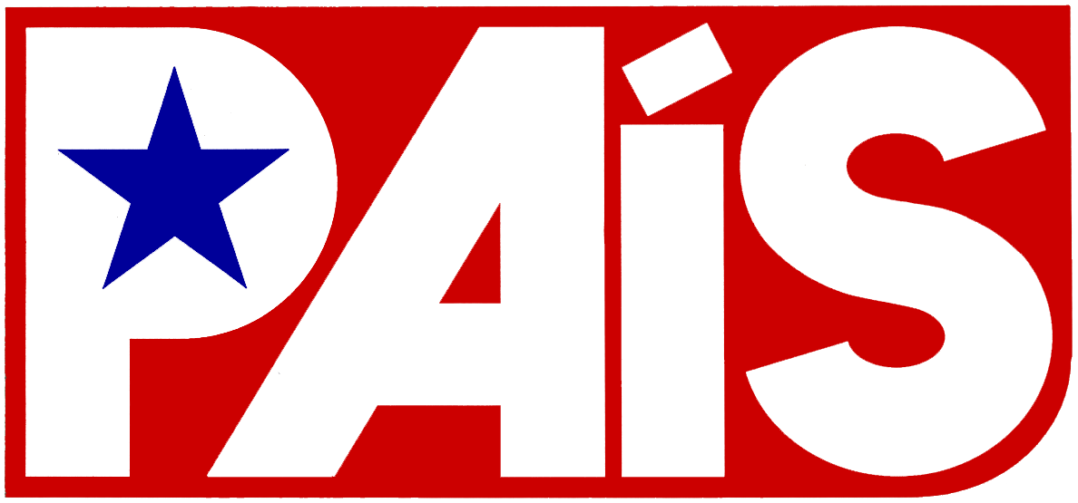 Emblema del Partido Amplio de Izquierda Socialista, partido existente en Chile entre 1988 y 1990.